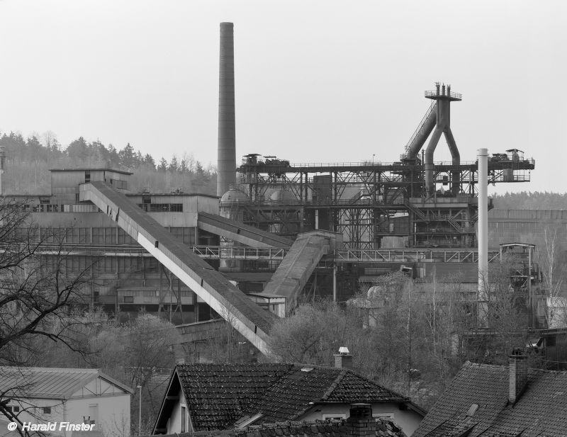 Möllerbunker und Hochofen Nr. 3 der Maxhütte in Sulzbach-Rosenberg